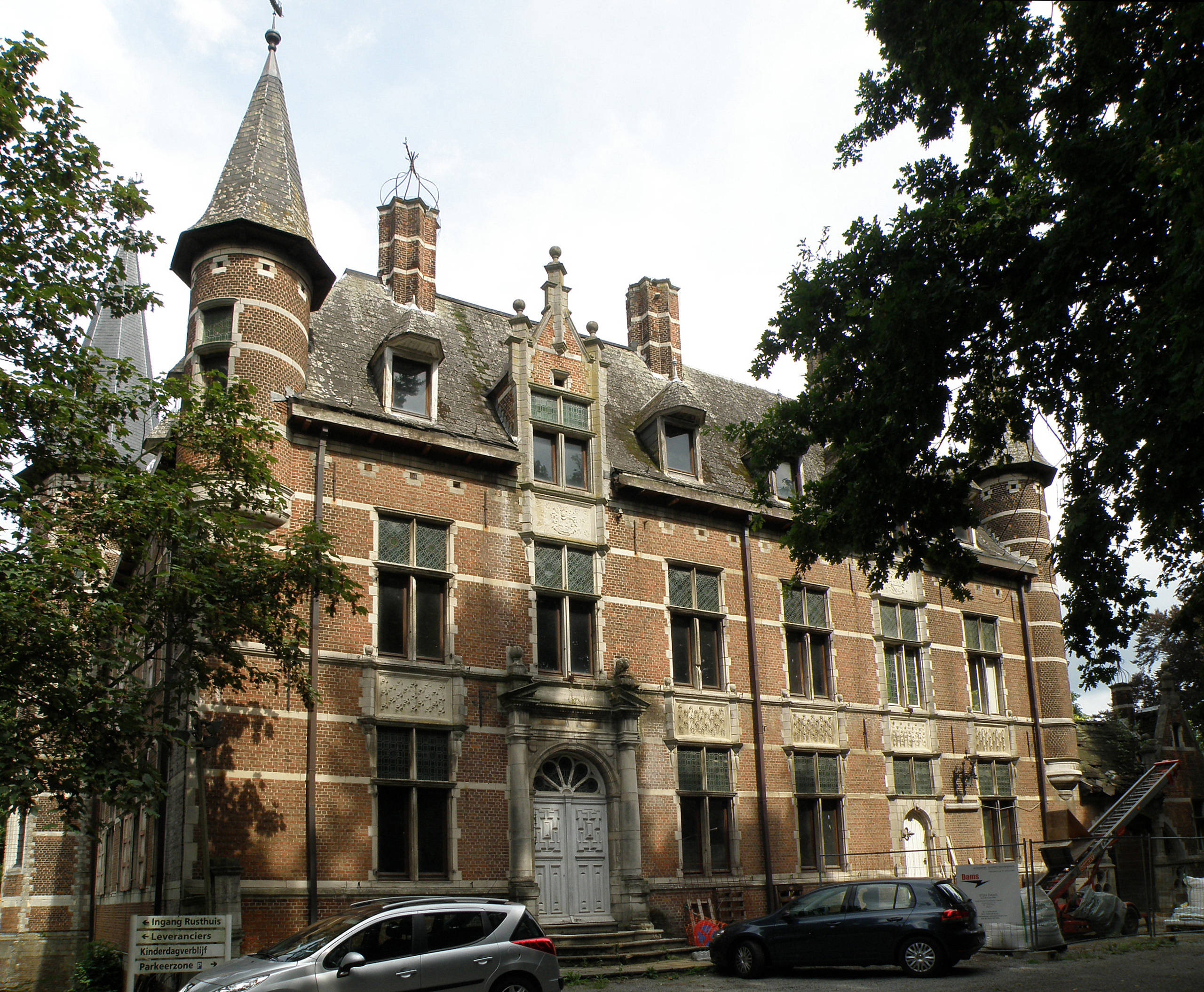 Wommelgem (prov. Antwerpen, België). Kasteel Selsaete, Selsaetenstraat nr.50.